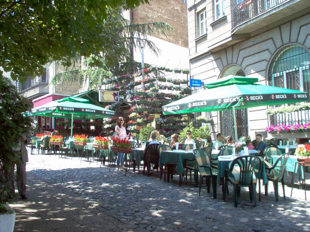 Скадарлија ...једна од многобројних летњих башти, Београд